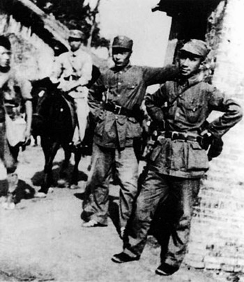 1940年，粟裕（右）、陈毅在苏北黄桥战役前夕。